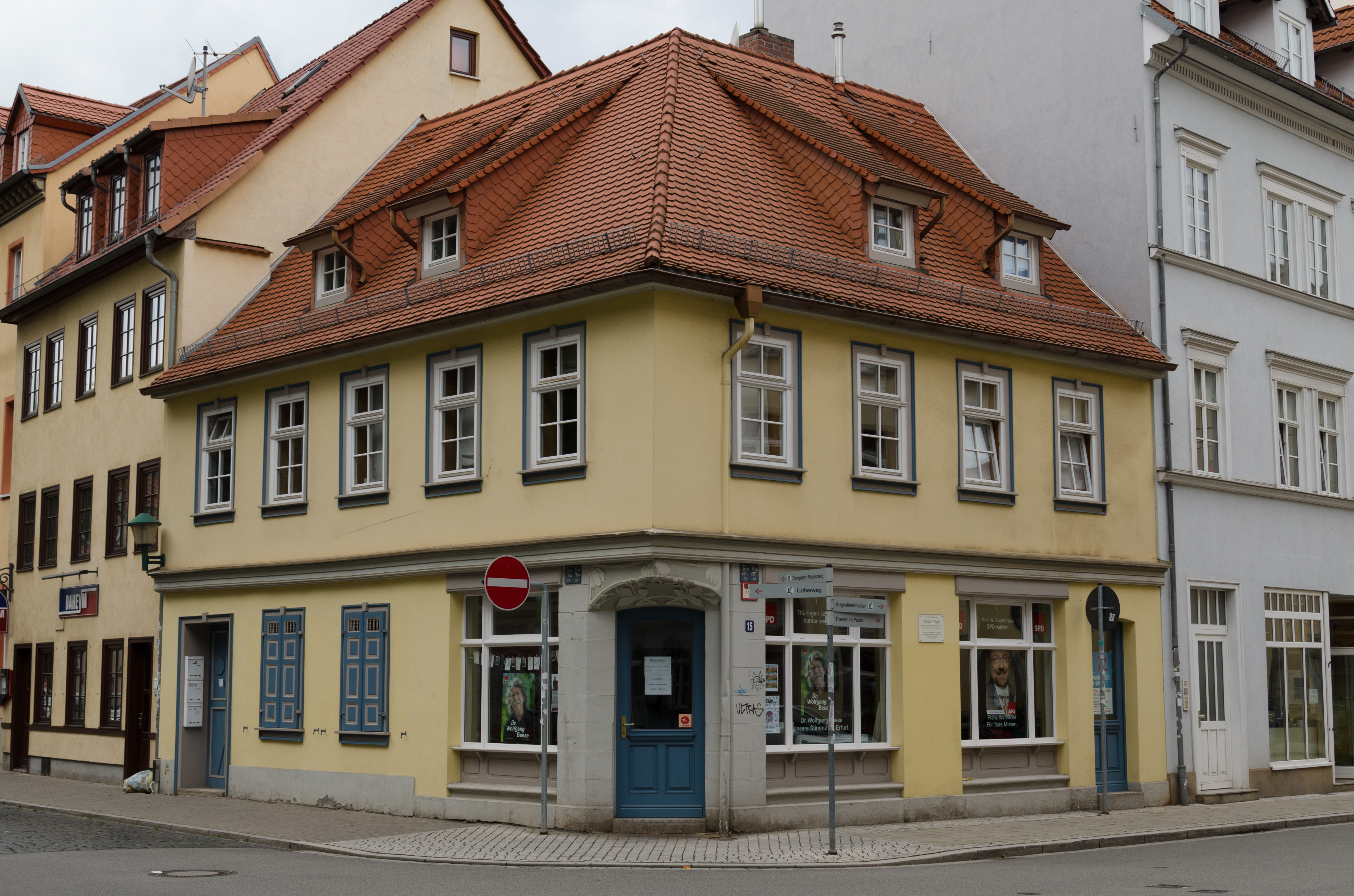 Erfurt, Michaelisstraße 15